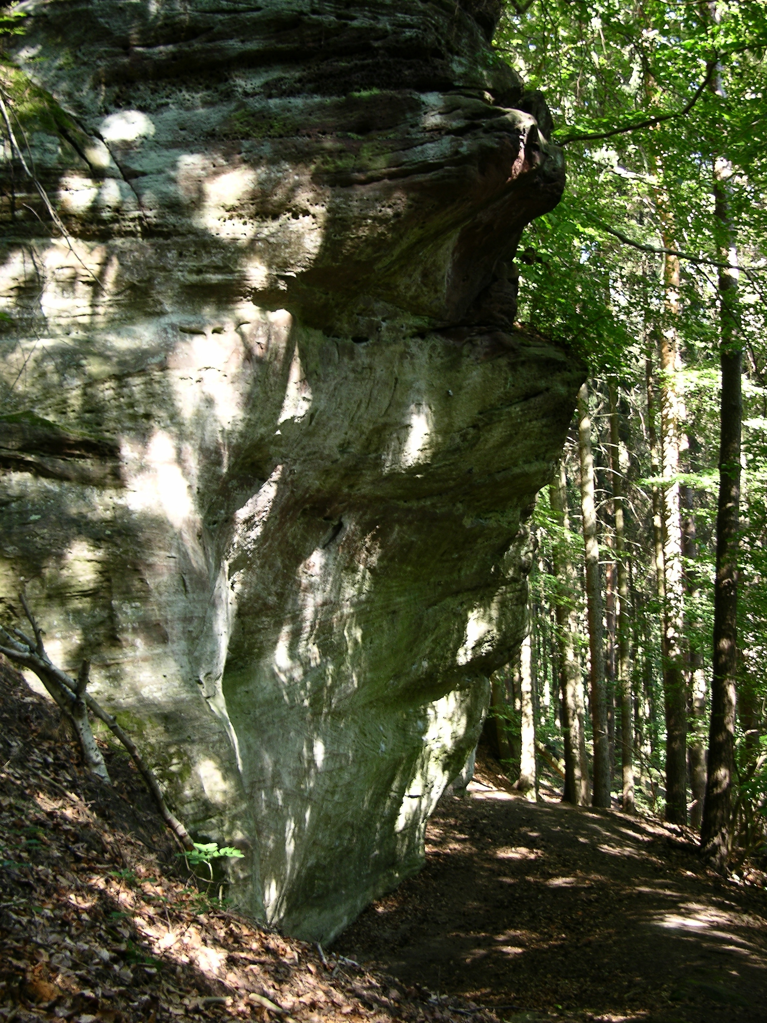 Das Abri IX am Bettenröder Berg, Totalansicht